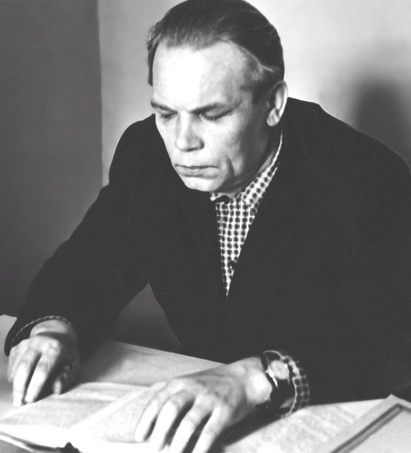 Эйно Генрихович Карху (1923—2008) — учёный-филолог, литературовед